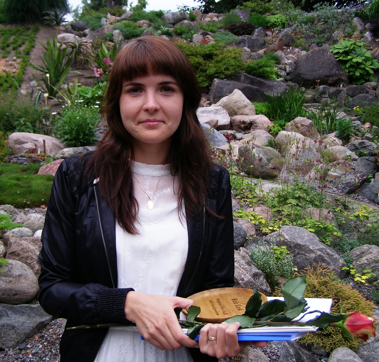 Kaia Kask (s. 1987) Olevi Kulli mälestusstipendiumi üleandmisel 22. juunil 2013 Tartu botaanikaaias.